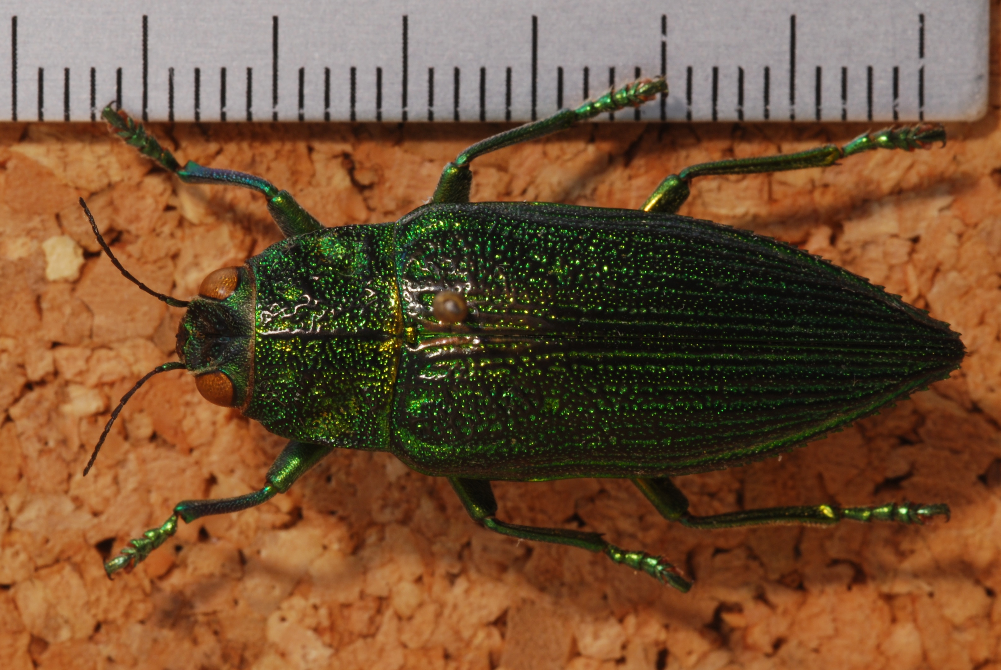 Central Palawan, PHILIPPINES